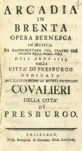 Titulný list k textu opery vytlačenému v knižnej podobe v Bratislave v r. 1759